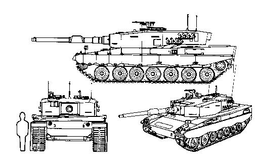 Leopard 2